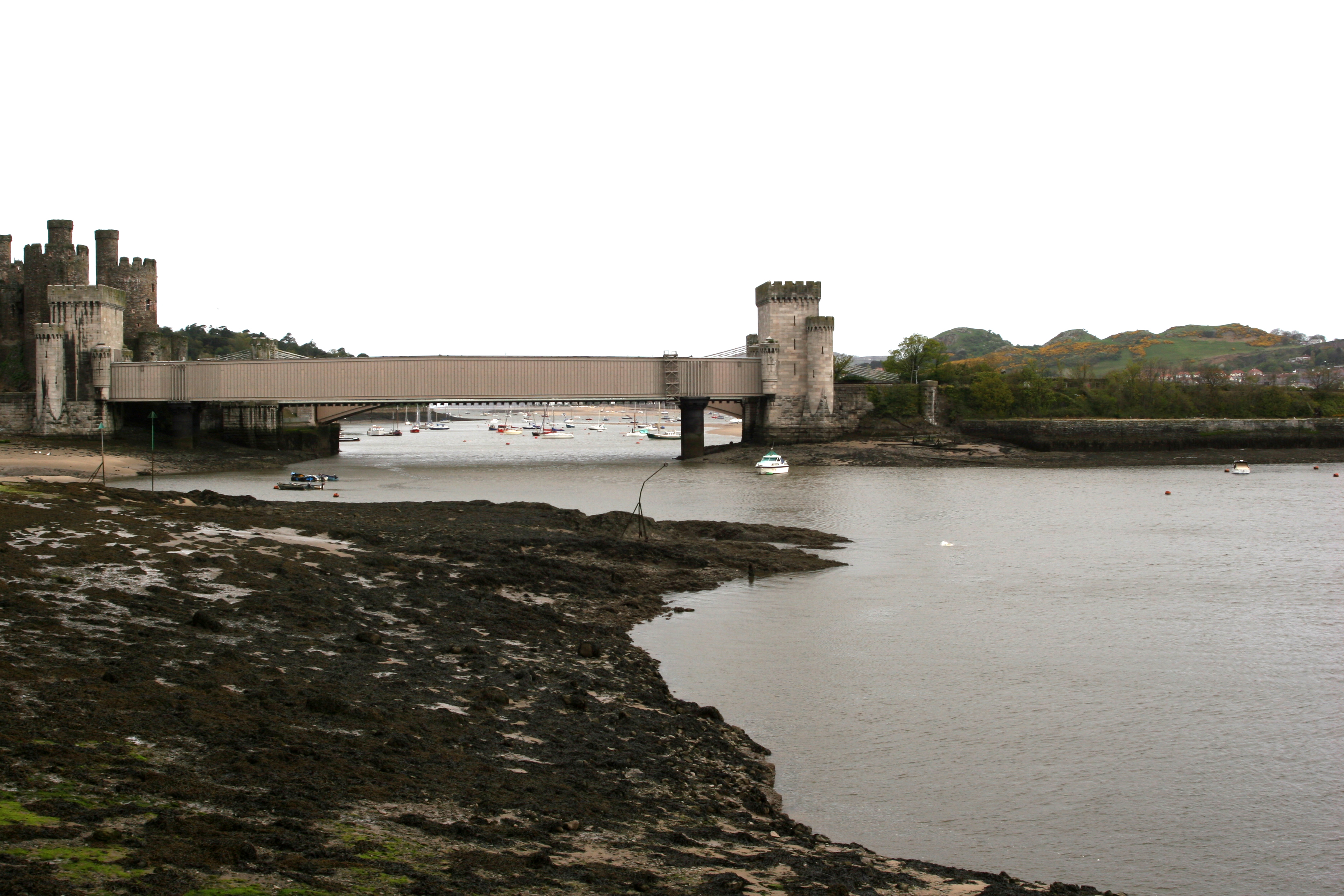 Afon Conwy yn nhref Conwy River Conwy at Conwy town. Rhion Pritchard